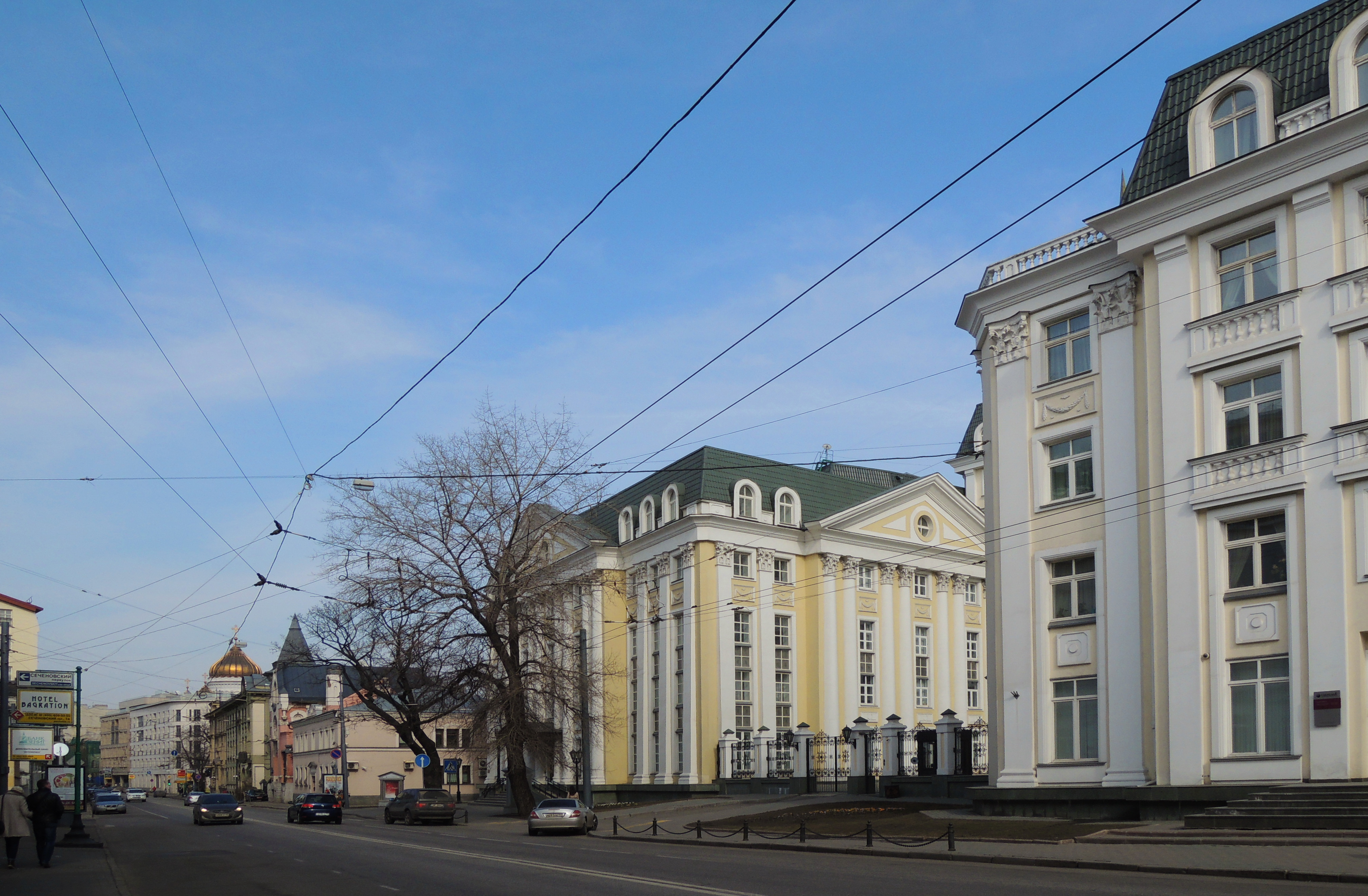 ул. Остоженка